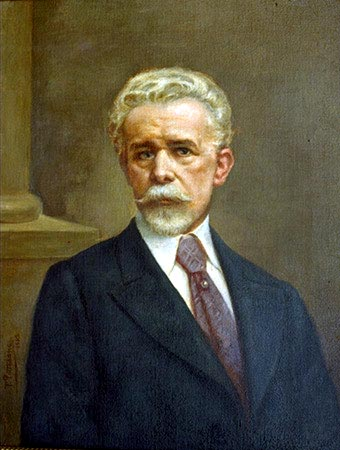 Autorretrato de Tomás Povedano de Arcos, pintor español radicado en Costa Rica